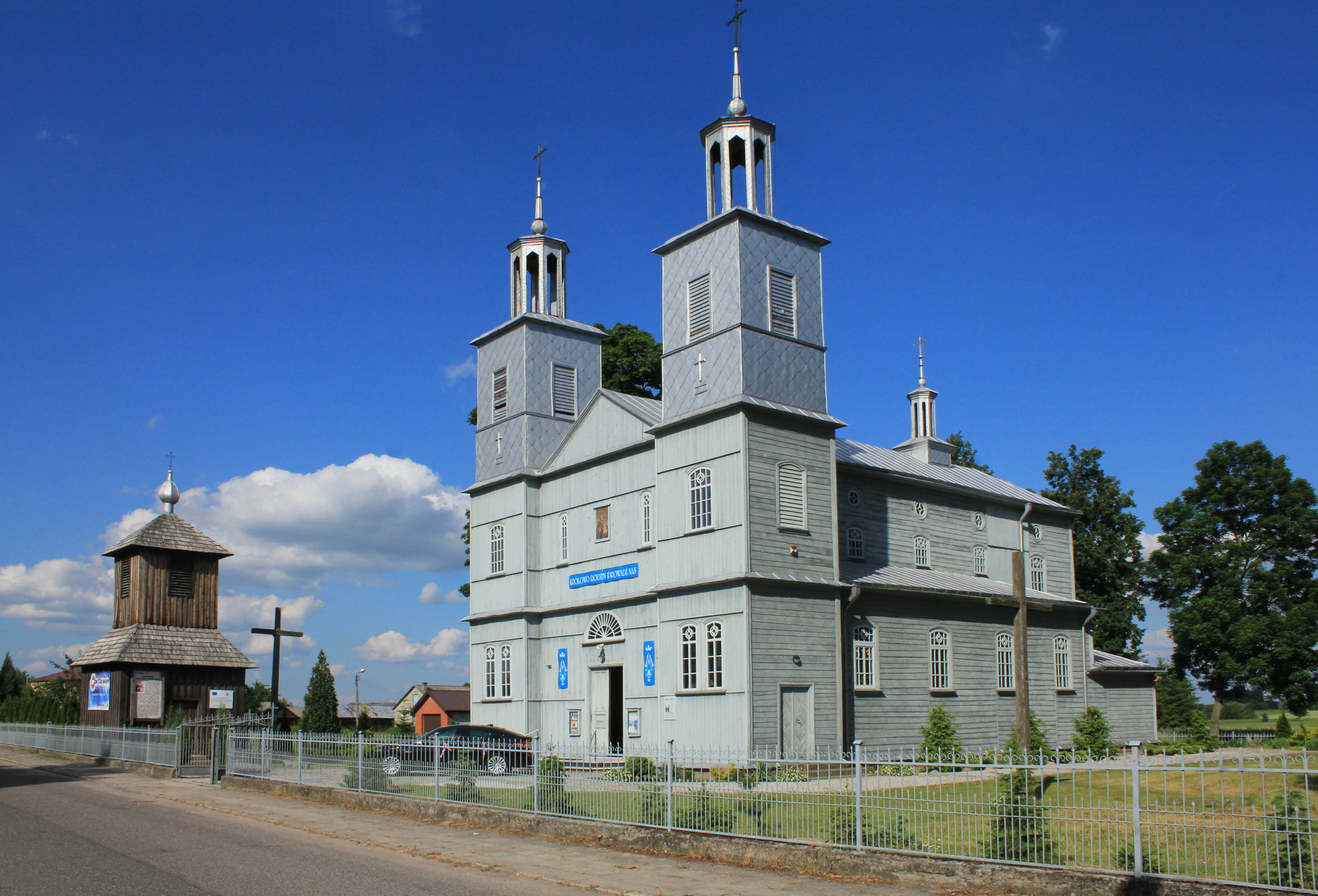 Kościół pw. Nawiedzenia NMP w Kolembrodach w województwie lubelskim, w powiecie radzyńskim, w gminie Komarówka Podlaska.